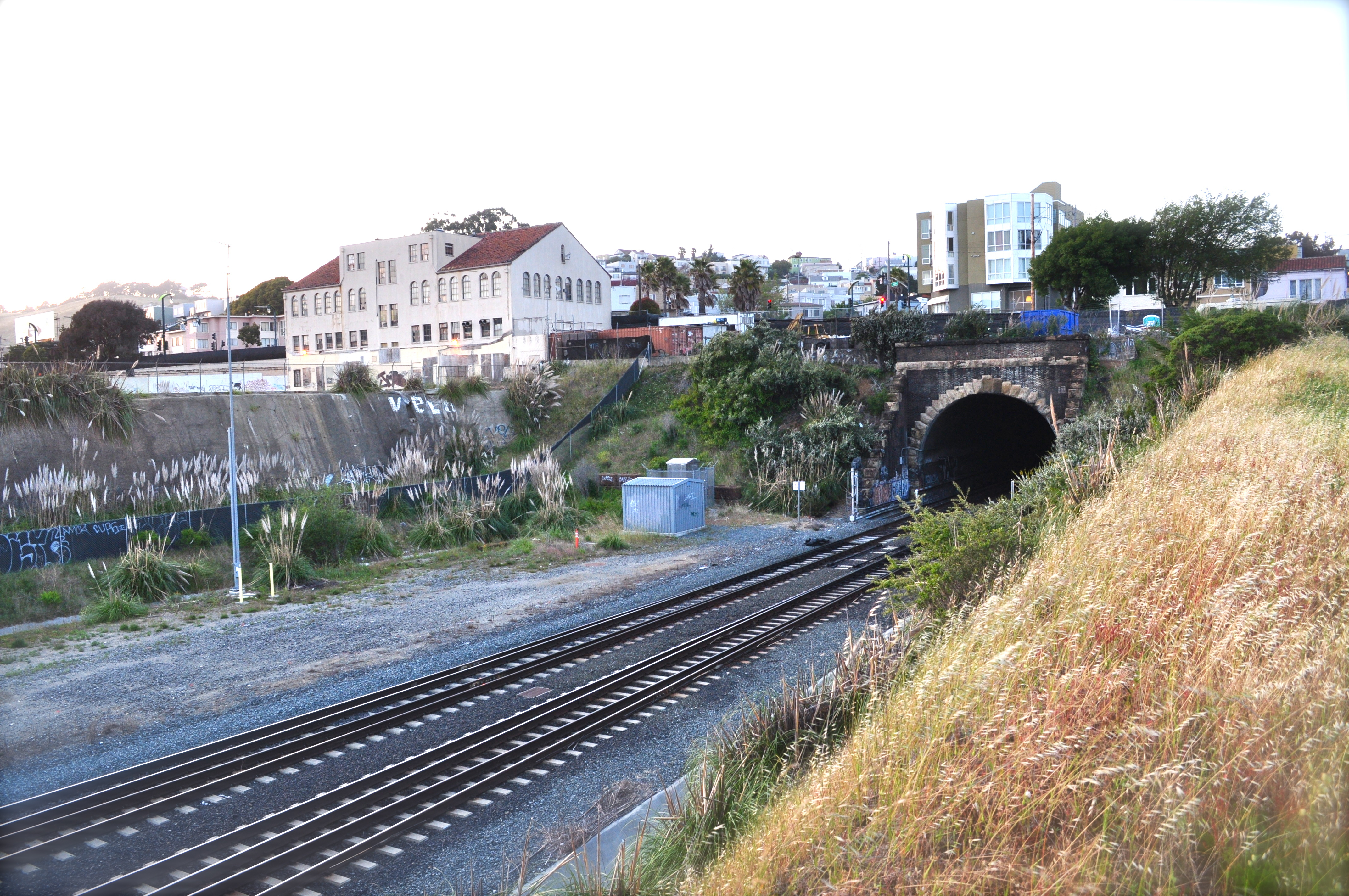 Caltrain tunnel, San Francisco